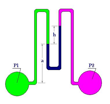 Autor: Alfredobi Fecha: abril 2006